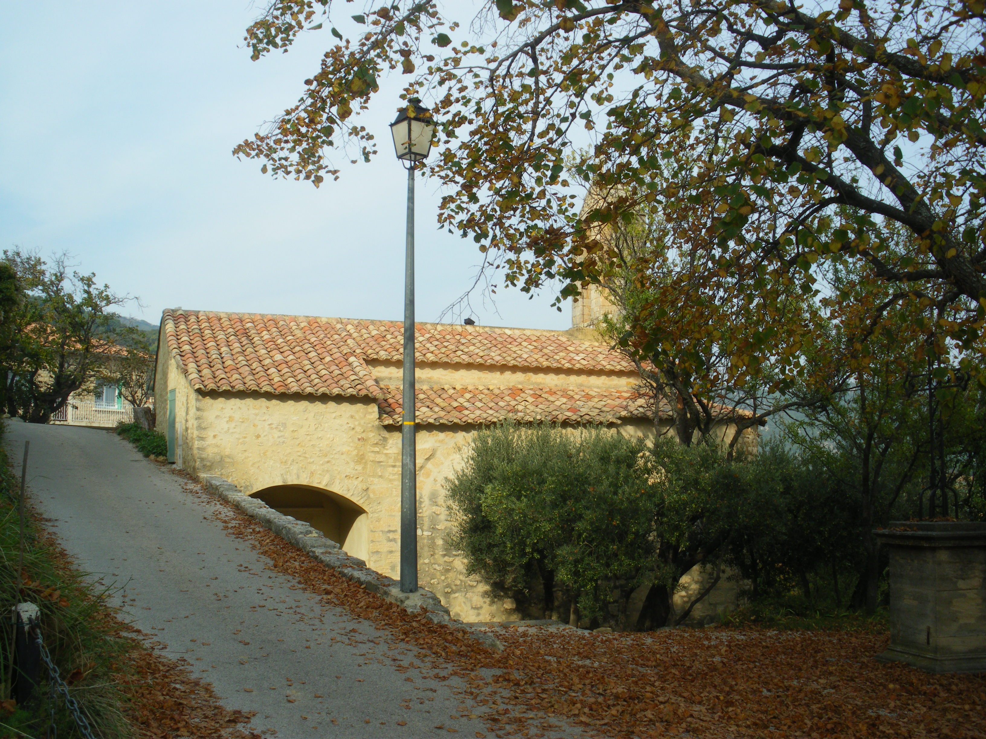 Notre Dame de Suzette, Vaucluse, France